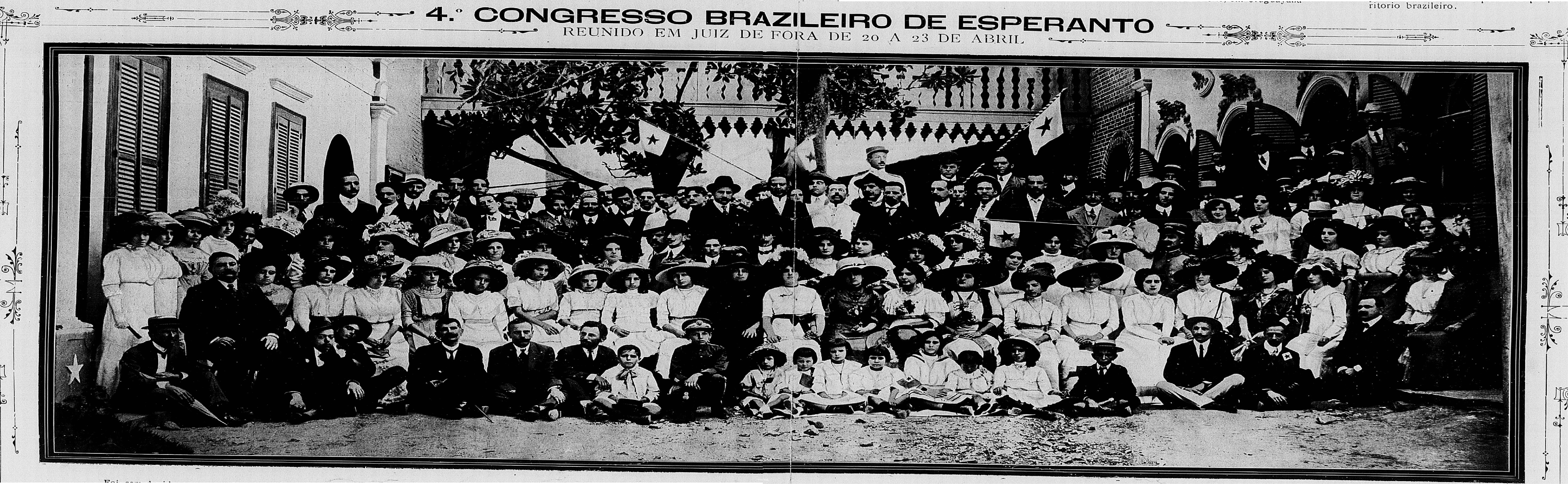 Partoprenantoj de 4-a Brazila Kongreso de Esperanto dum pikniko en la parko Weiss, en la urbo Juiz de Fora, Minas-Ĝerajso, 1911.